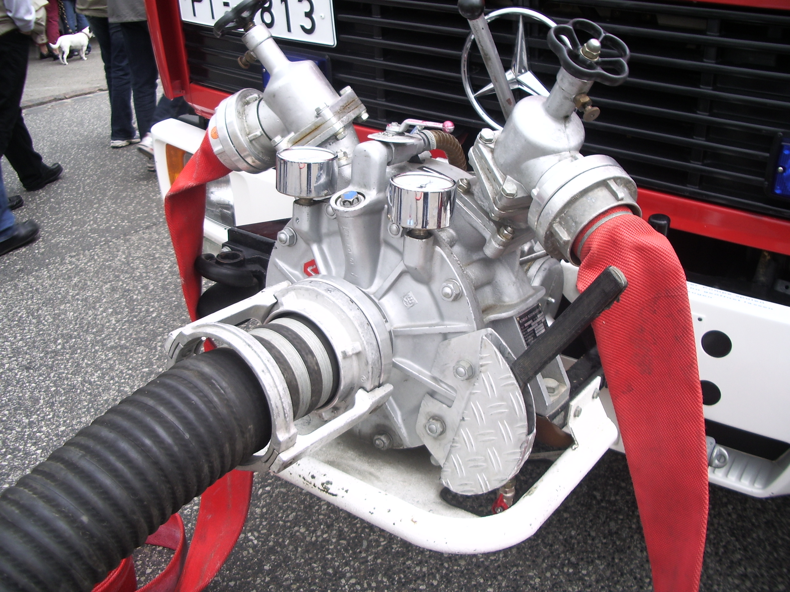 Die Frontlöschpumpe des Löschgruppenfahrzeug 8 (LF 8) der Freiwilligen Feuerwehr Uetersen (DKL 23/12).